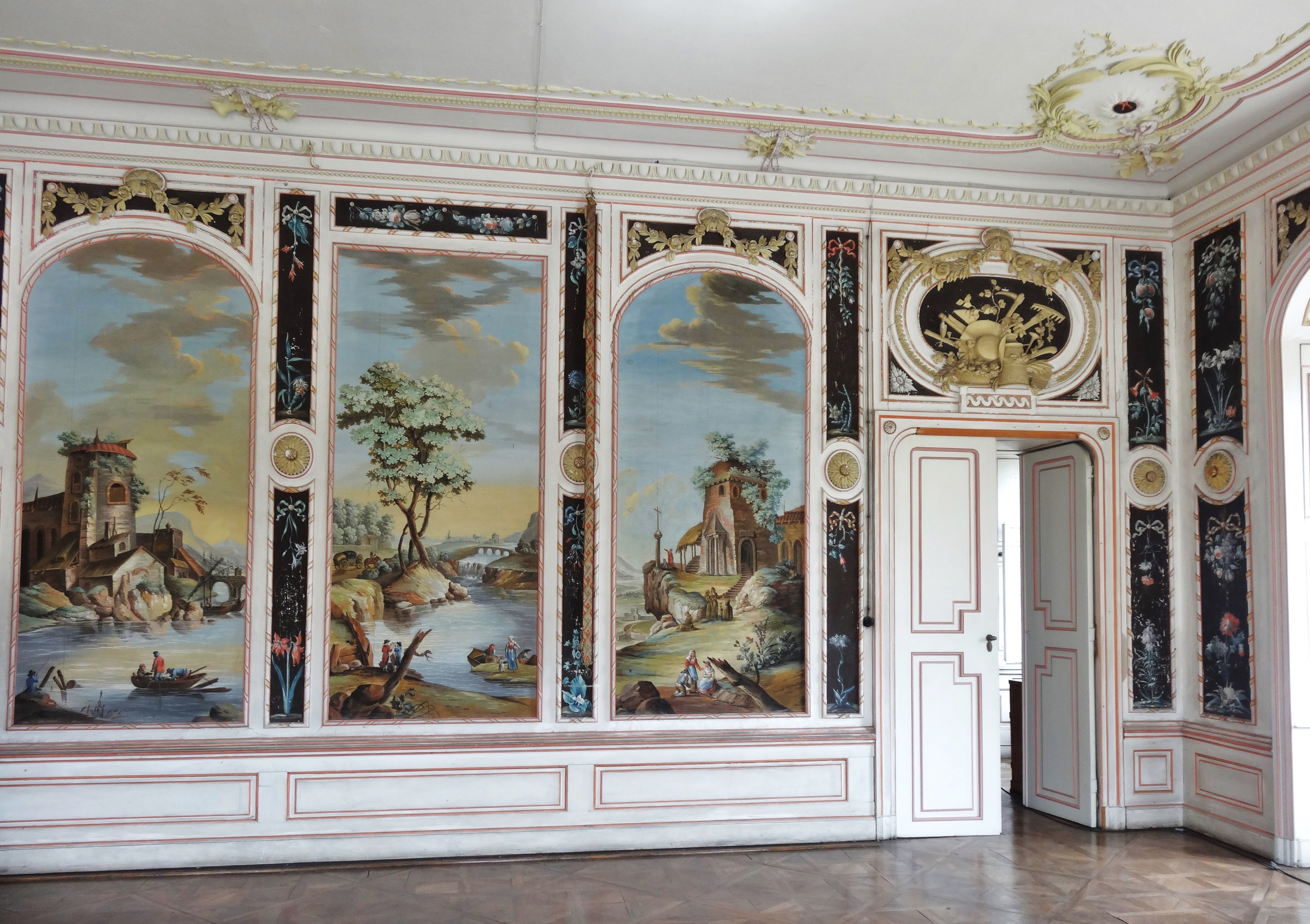 Schloss Pöckstein, Empfangssaal